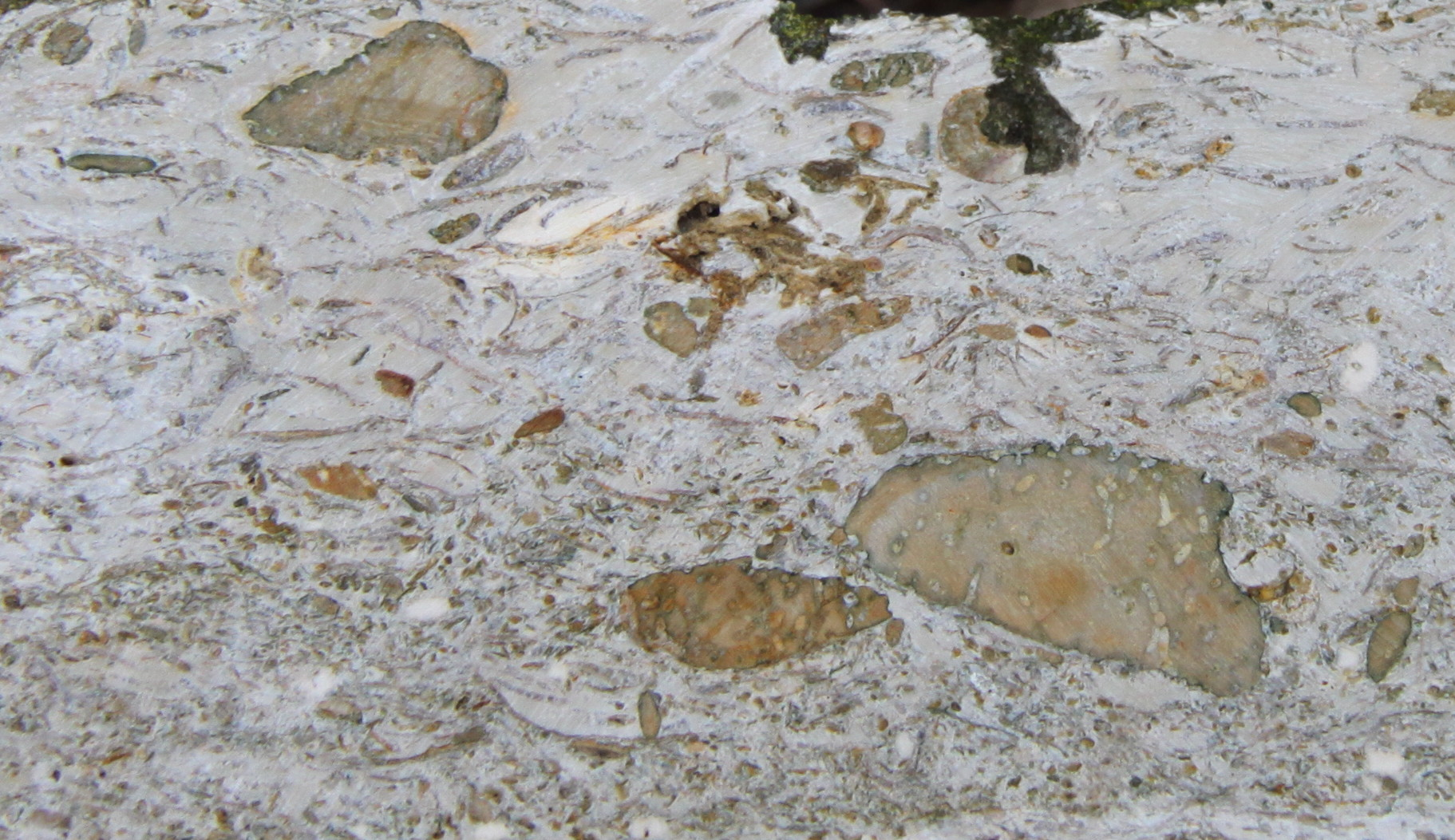 Tempestit, Elmkalkstein, Niedersachsen bei Königslutter, ca. 8 x 5 cm Tempestit, Limestone (Elmkalkstein) in Germany, Lower Saxons, Königslutter 8 x 5 cm